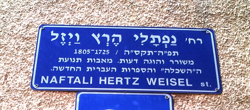 שלט רחוב נפתלי הרץ וייזל בתל אביב